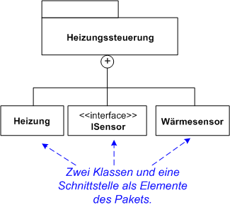 Paket (UML2) - Beispiel 4